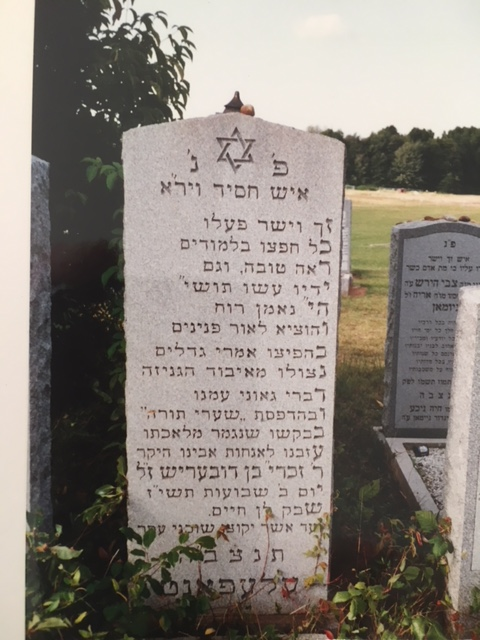 מצבה של הרב זכריהו אלפנט